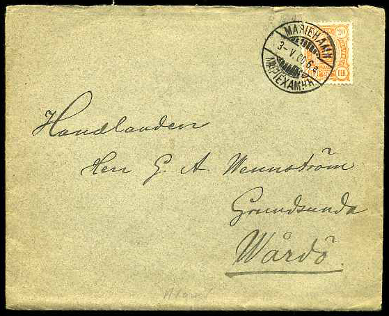 Почтовый конверт, отправленный из Мариехамна (Аландские острова) в Вордё в 1900 году с маркой Великого княжества Финляндского седьмого выпуска, 1889, 20 пенни